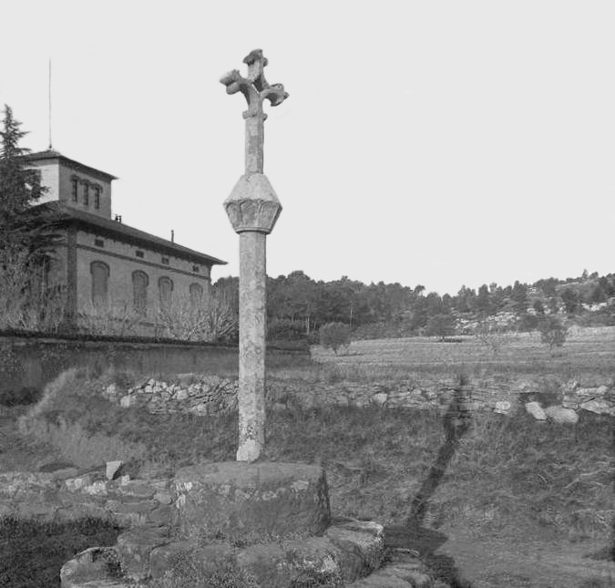 Creu de terme de Begues a contrallum. Josep Salvany i Blanch (1916)